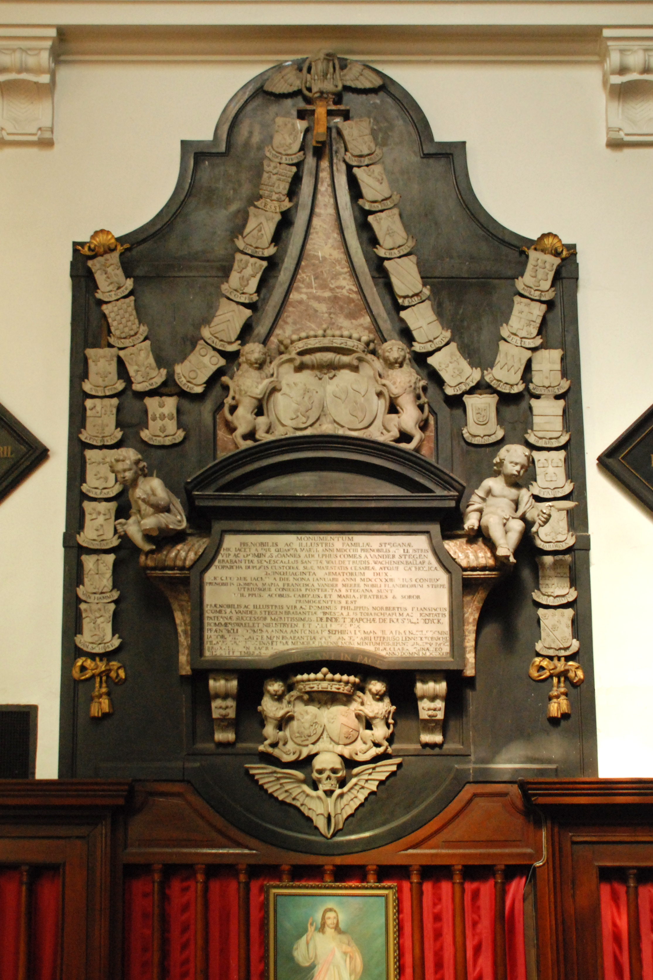 Belgique - Bousval - Église Saint-Barthélemy de Bousval